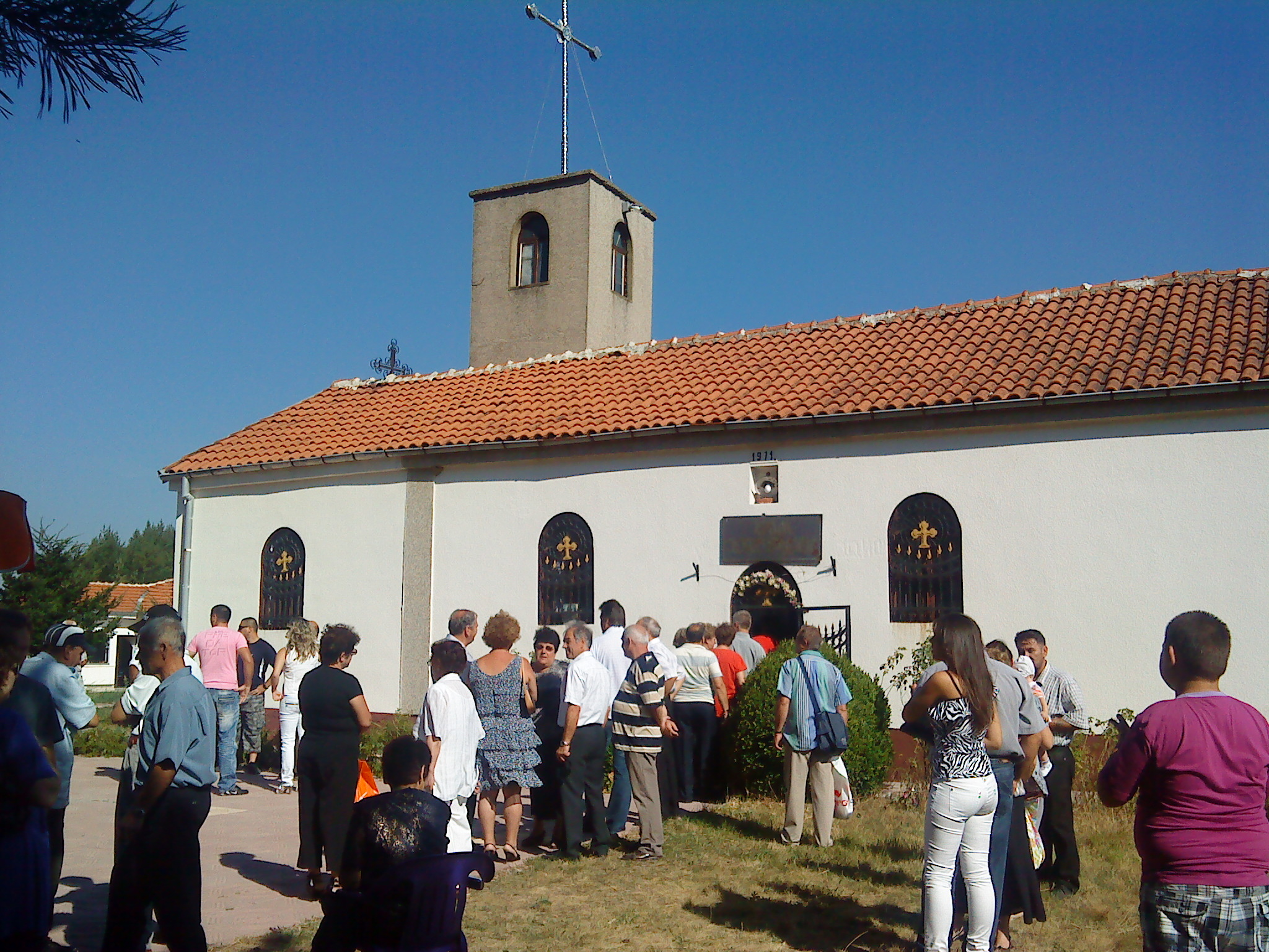 Голема Богородица во дворот на црквата Св.Богородица превој Ѓавато